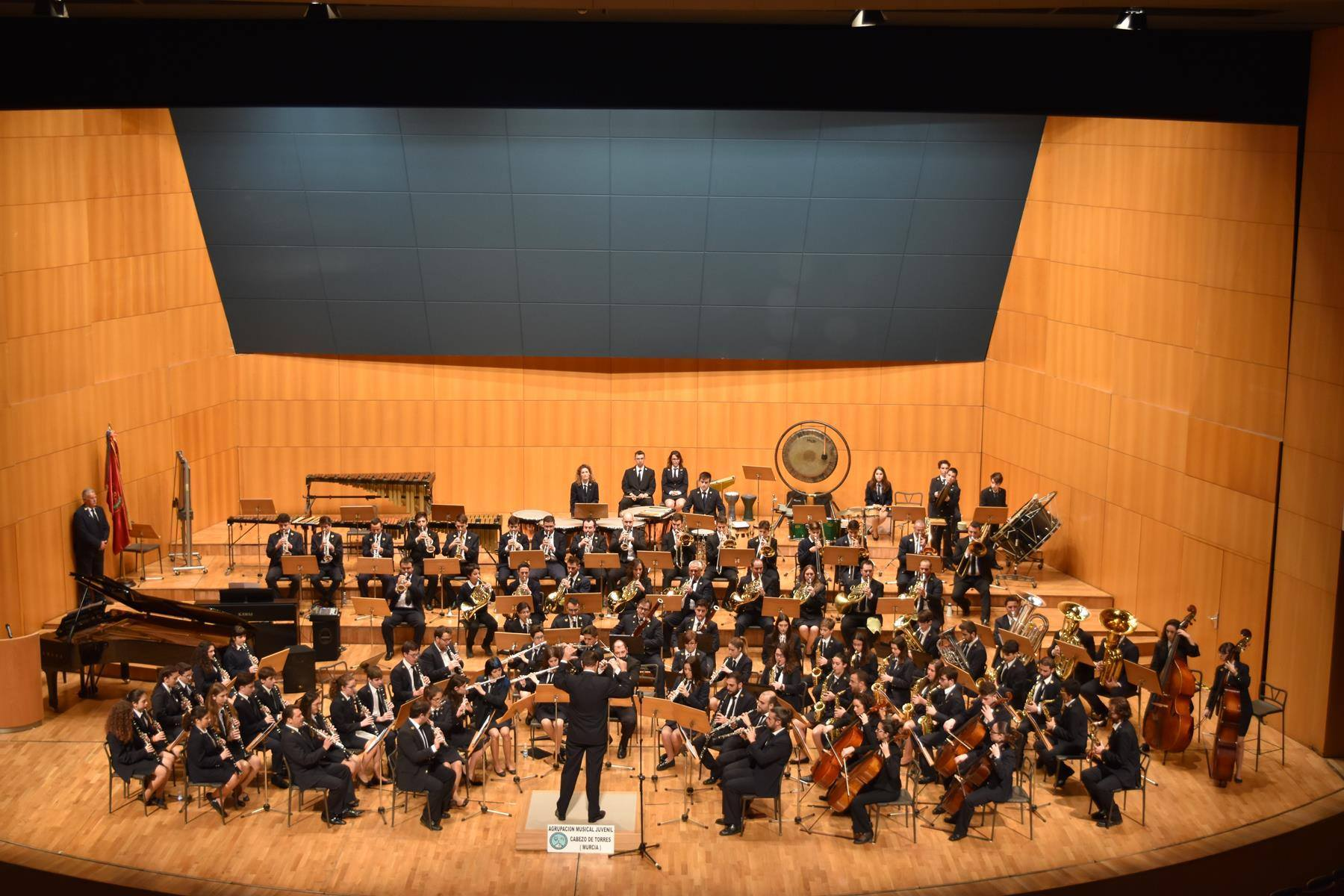 AMJCT en concierto en Auditorio Victor Villegas de Murcia